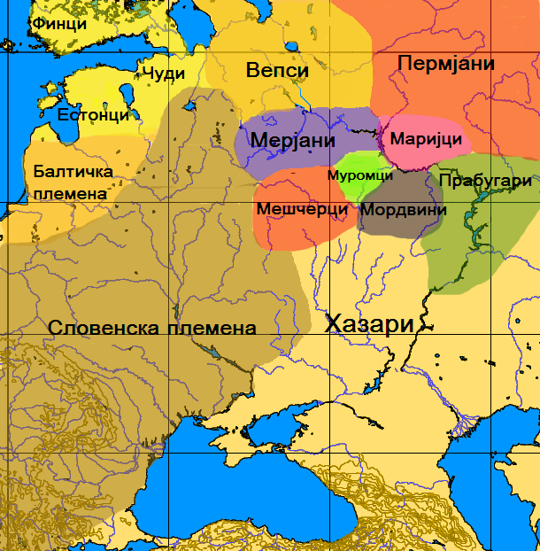 Српски (ћирилица): Историја Русије